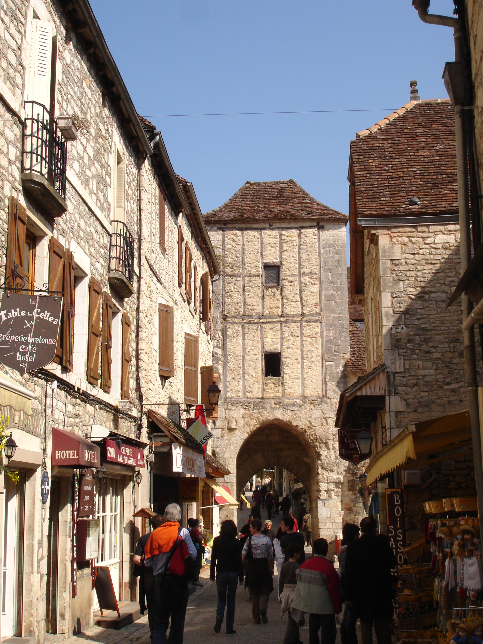 France, Lot (46), Rocamadour, rue principale